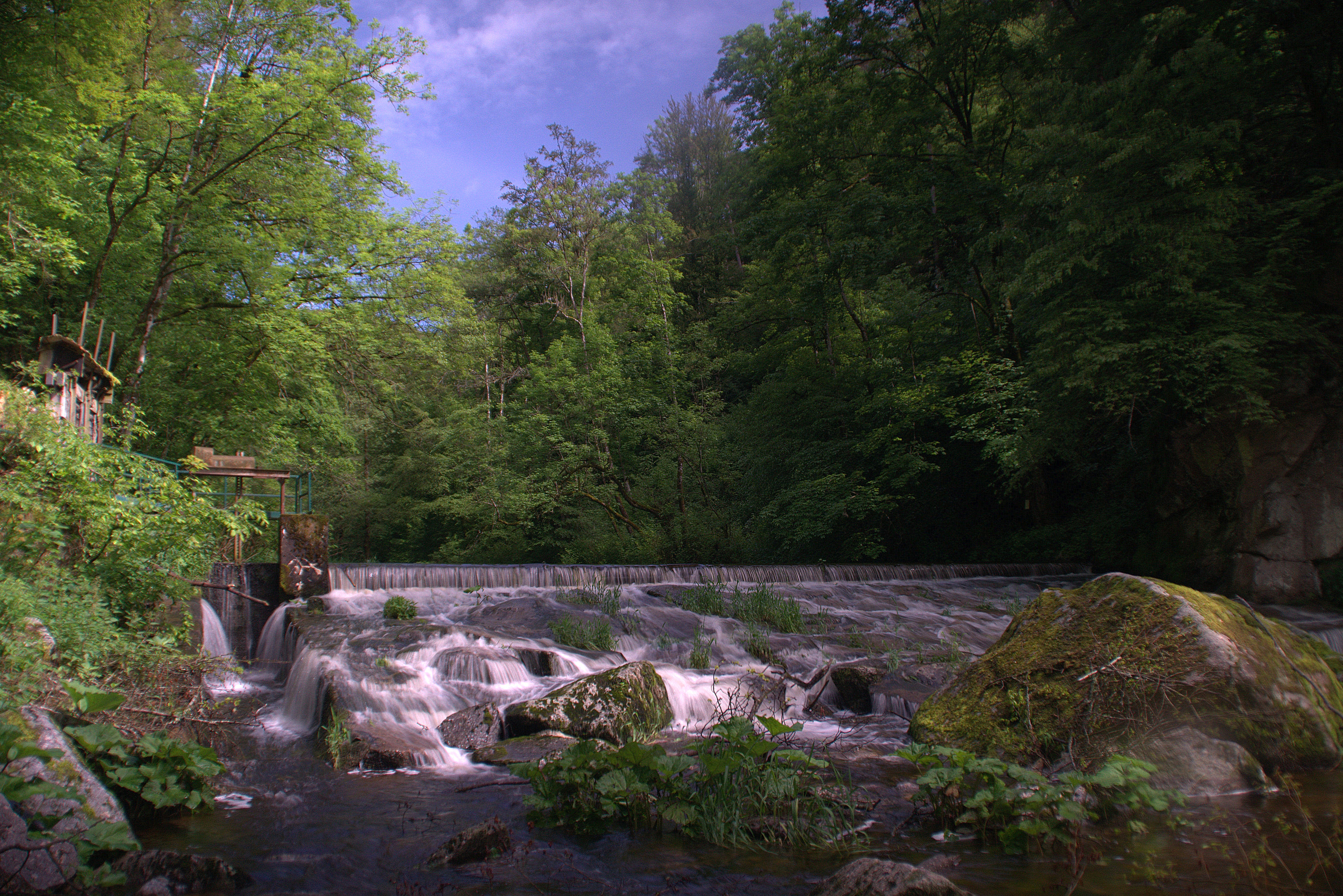 Die Alb bei Tiefenstein in Görwihl (nahe Gemeindegrenze zu Albbruck); Landschaftsschutzgebiet „Albtal (Unterlauf der Hauensteiner Alb)“ (LSG 3.37.001)